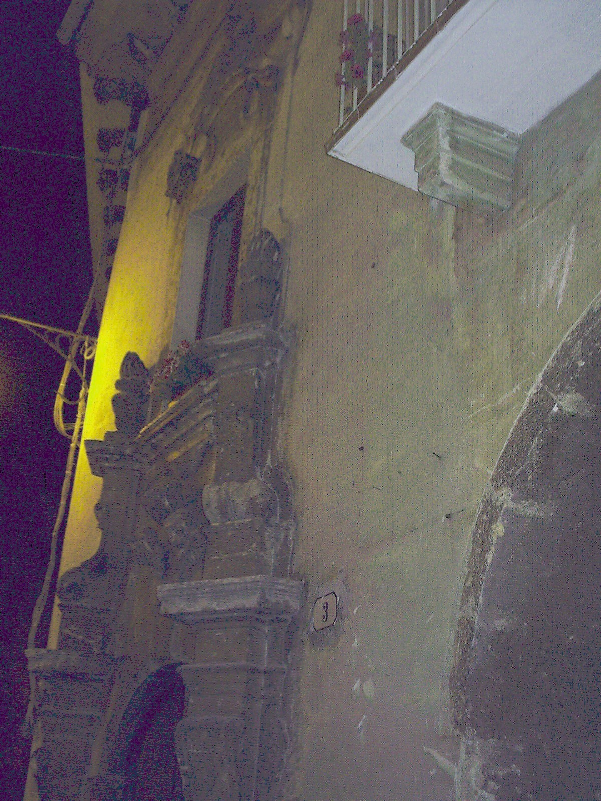 Palazo Serafini (Scanno, provincia dell'Aquila)